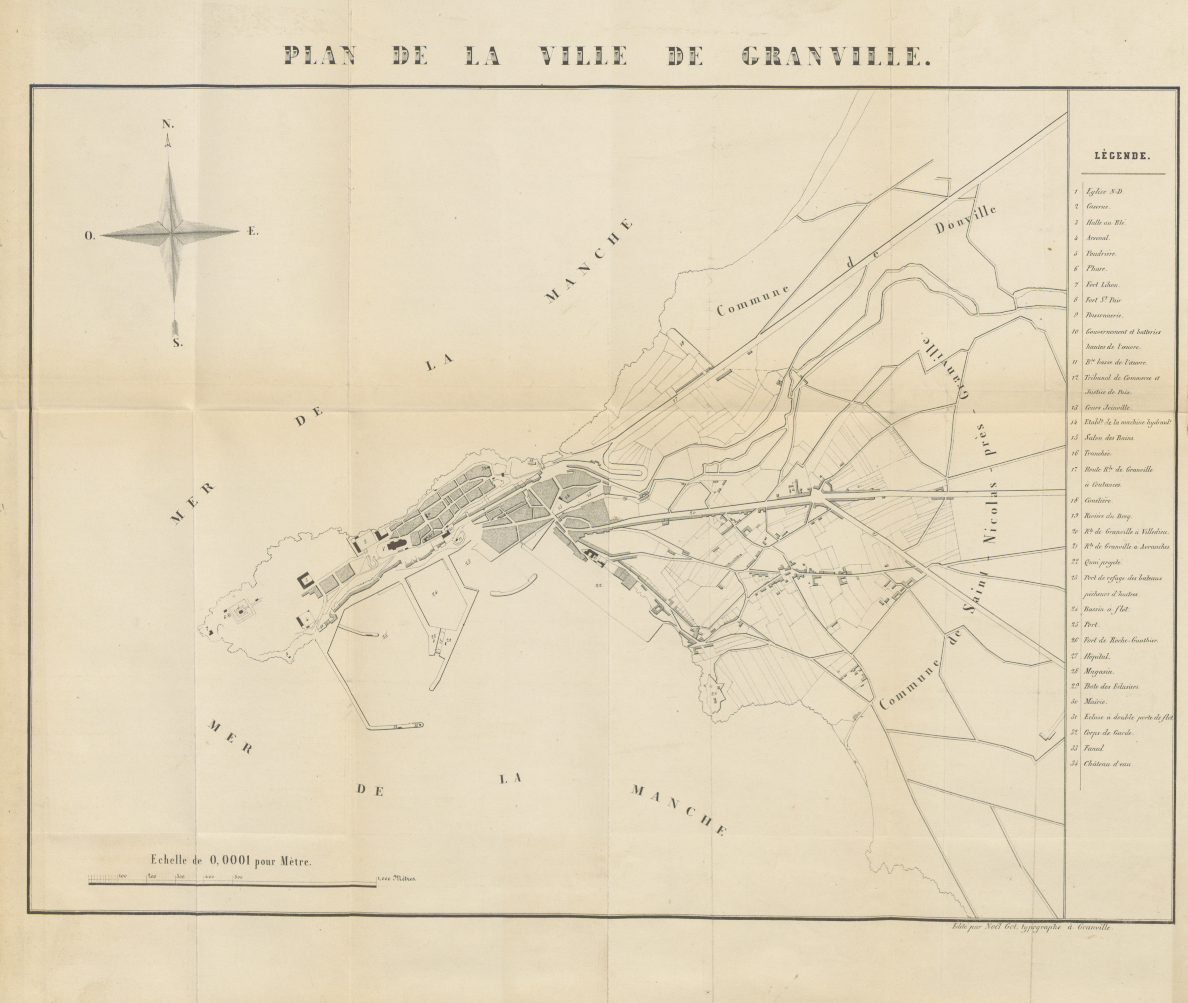 Plan de Granville en 1846, publié dans la "Notice sur la ville de Granville" de Guidelou